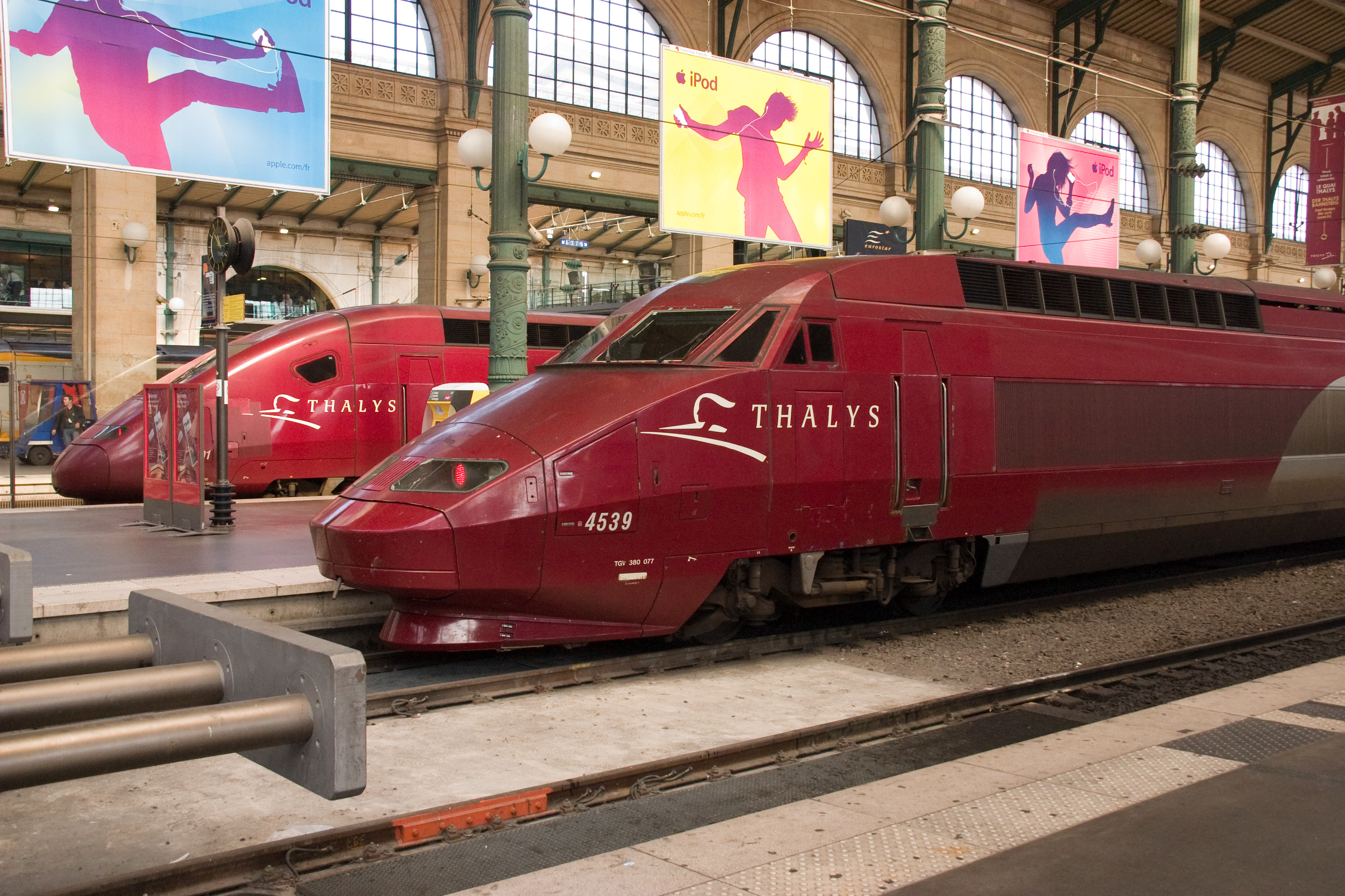 Gare du Nord, Paris, France